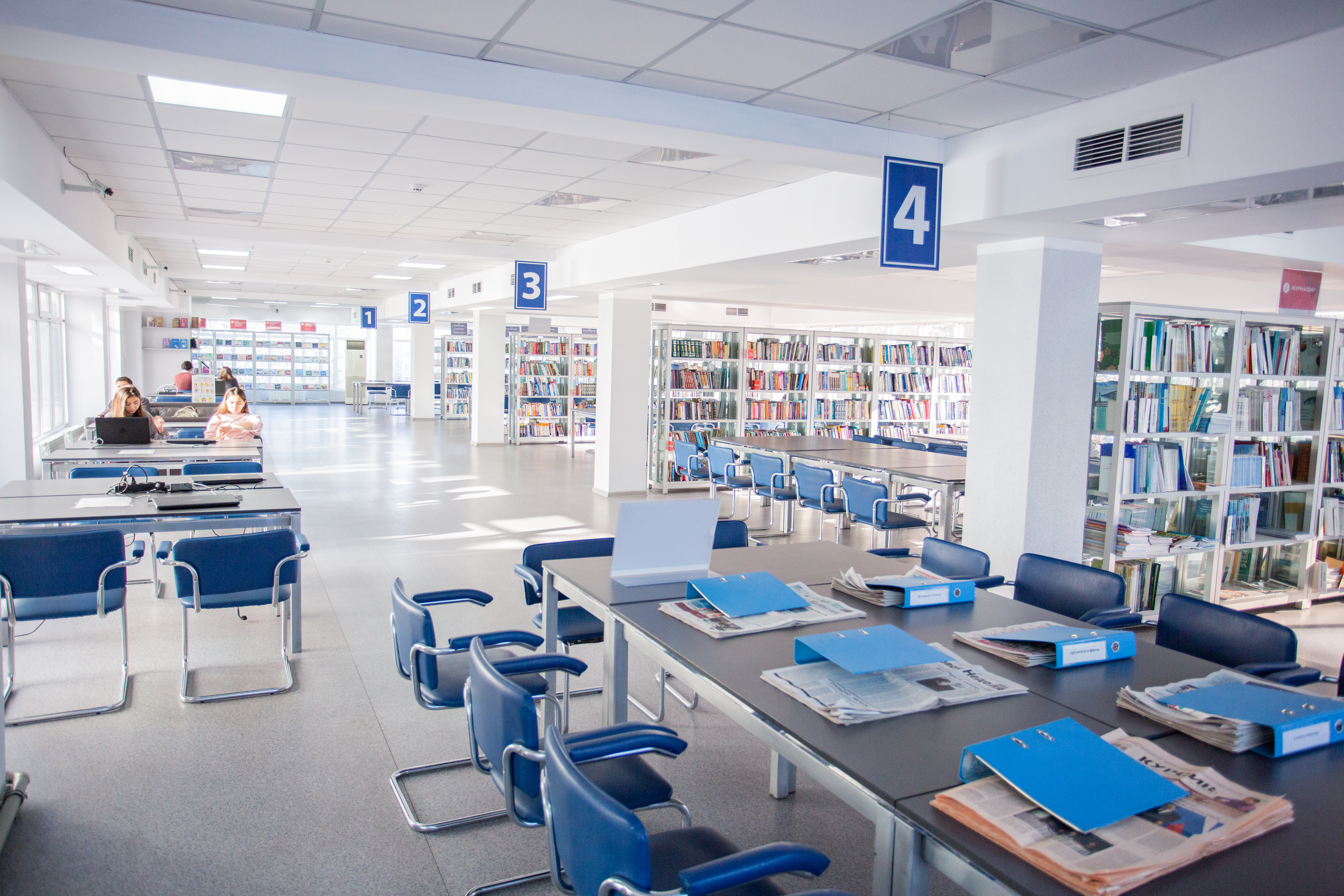 Университет Нархоз